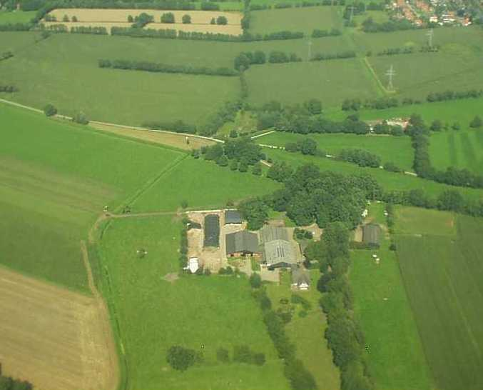 Aussiedlerhof südlich von Bremen